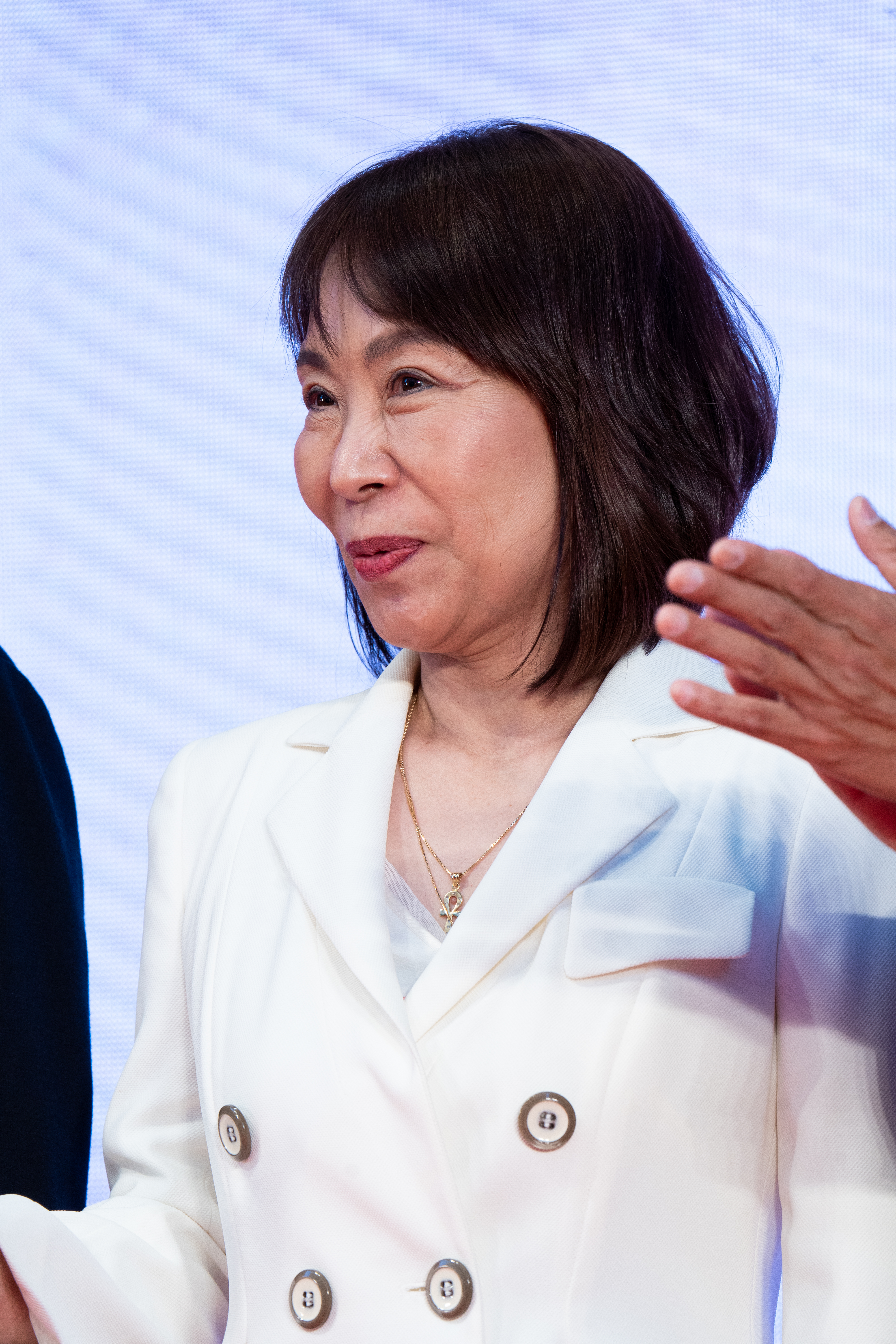 第32回 東京国際映画祭 オープニングセレモニー 田中栄子 (ジャパニーズ・アニメーション「THE EVOLUTION OF JAPANESE ANIMATION/VFX」)